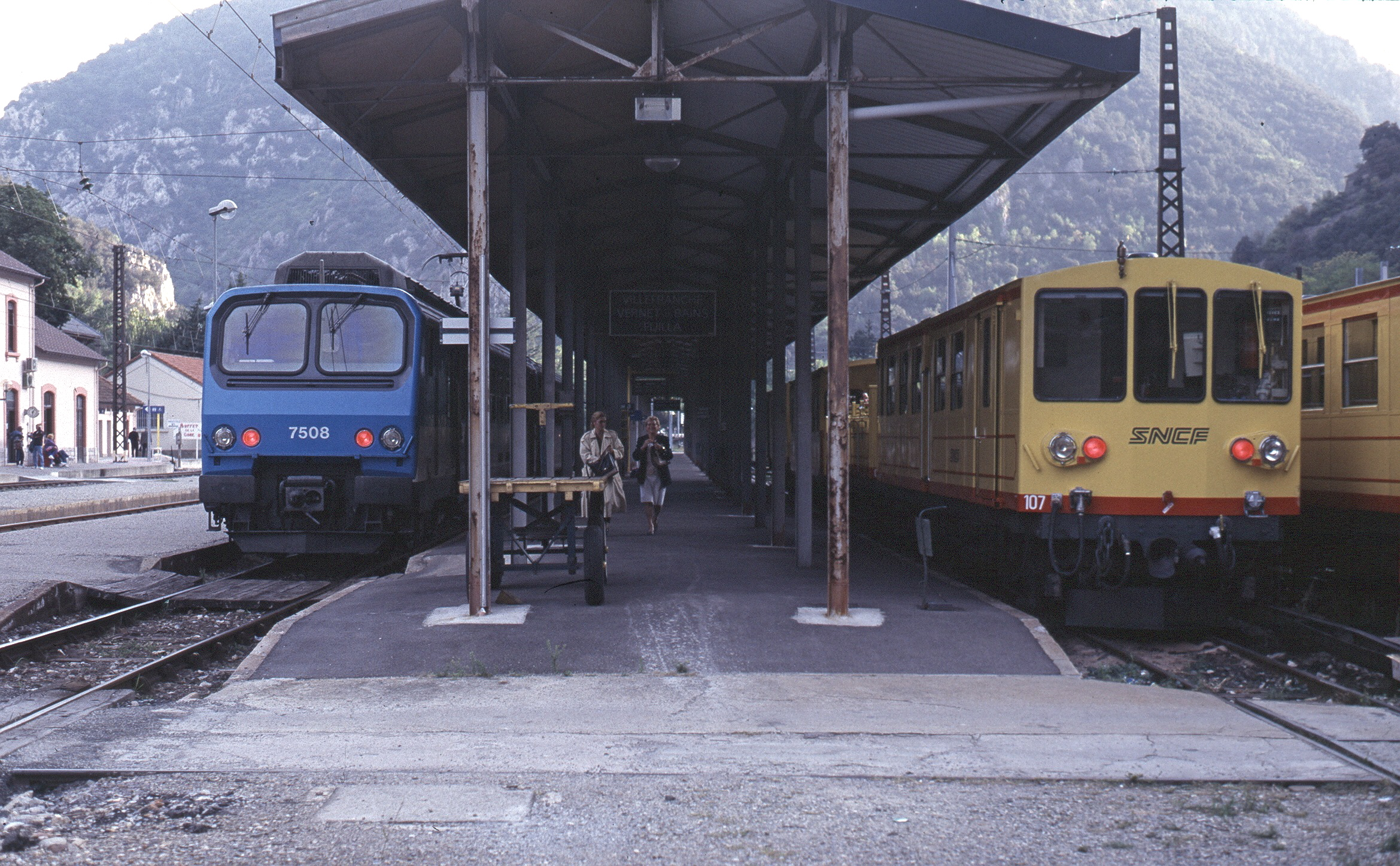 Gare de Villefranche-de-Conflent